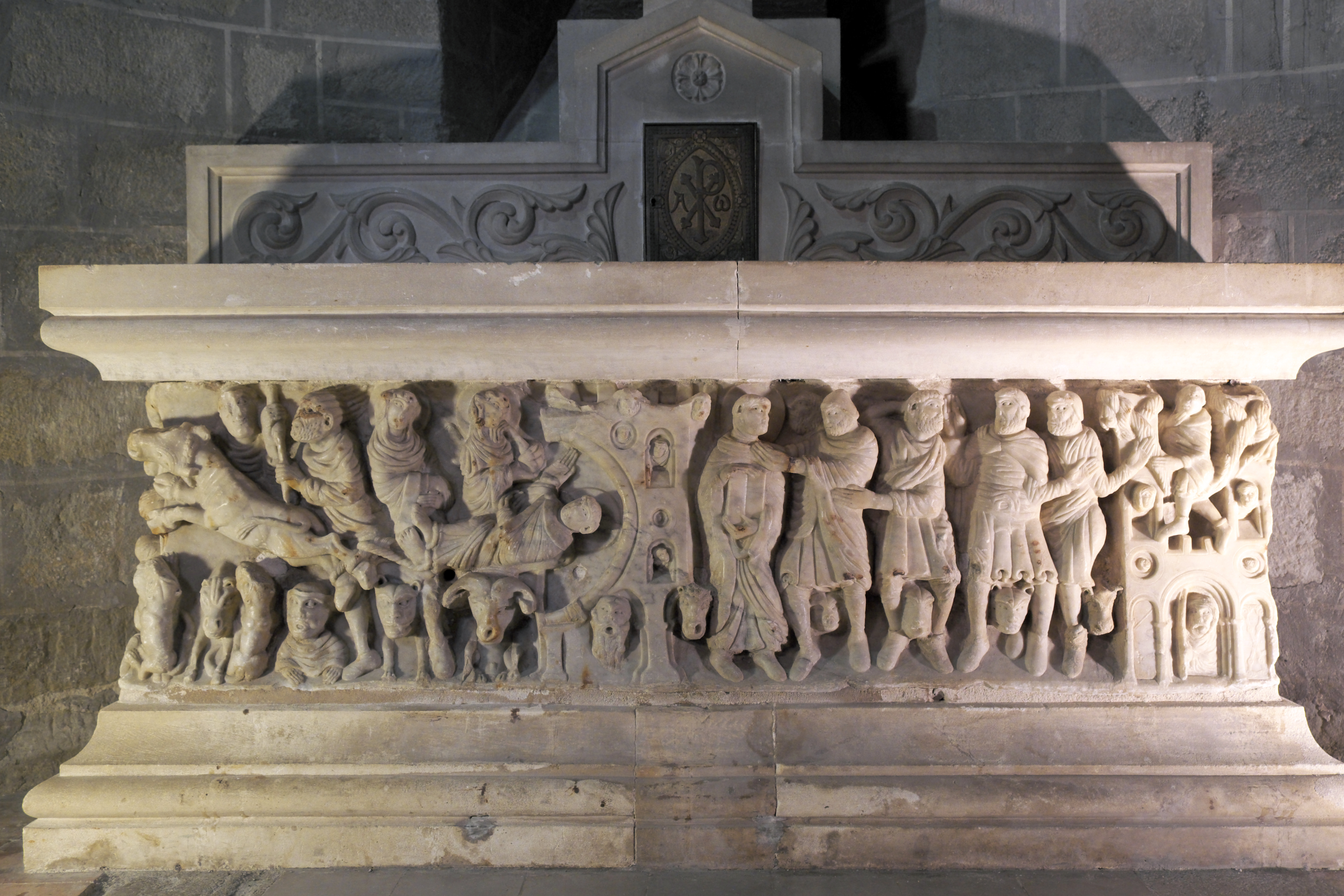 Sarkophag des hl. Saturninus von Toulouse in der ehemaligen Abteikirche der Abtei Saint-Hilaire in Saint-Hilaire im Département Aude (Region Languedoc-Roussillon/Frankreich), aus dem 12. Jahrhundert, dem Meister von Cabestany zugeschrieben, aus weißem Marmor aus den Pyrenäen